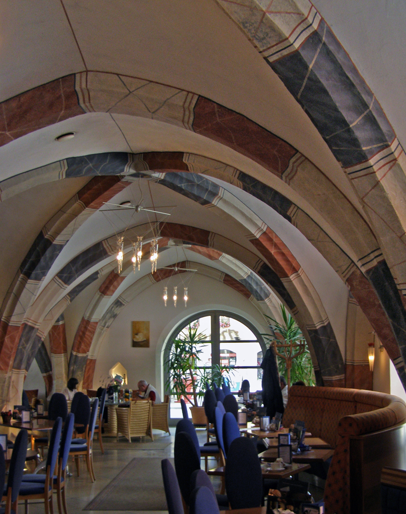 Unterhospital Memmingen - einstige "Dürftigenstube"